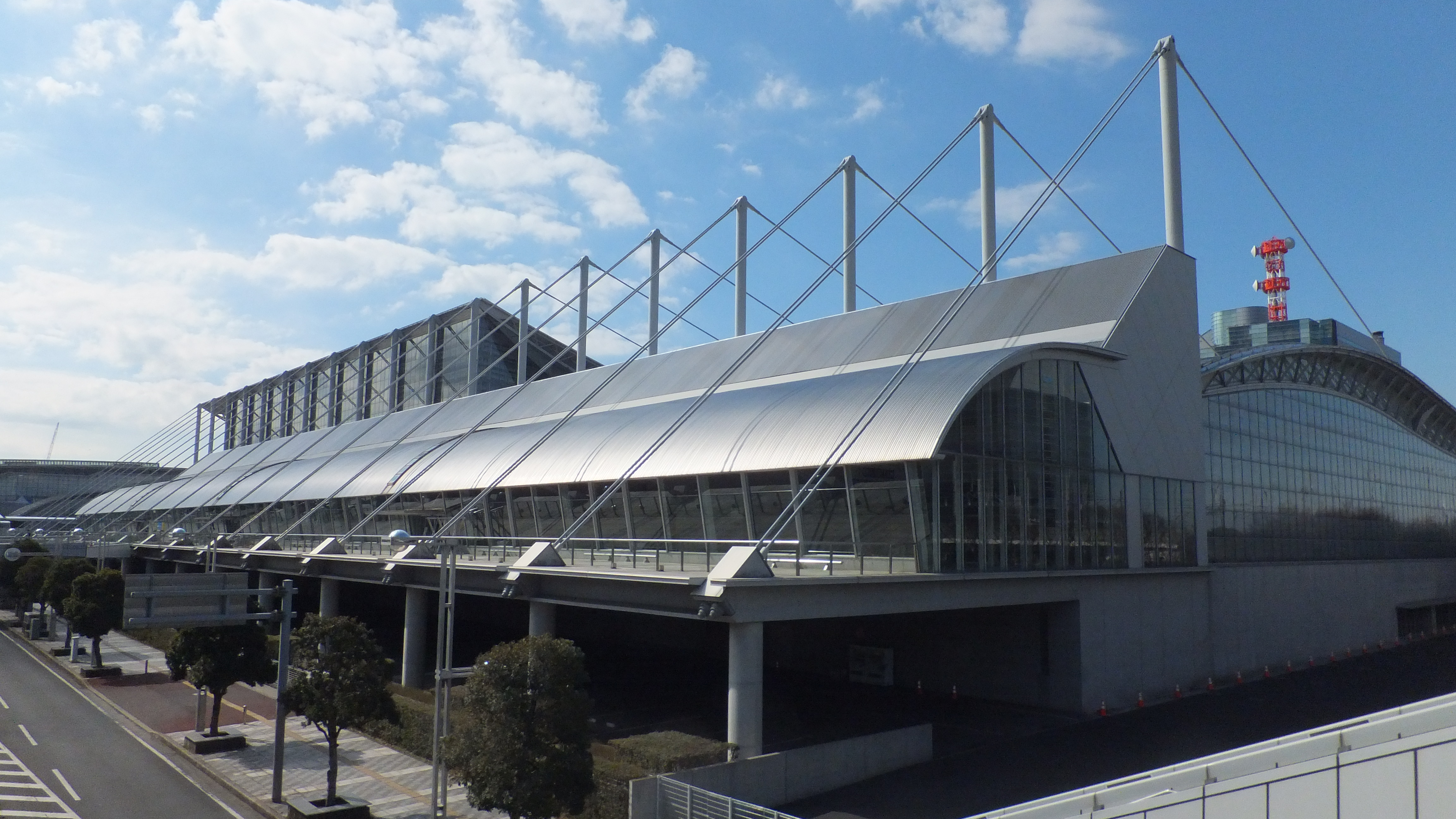 幕張メッセ国際展示場棟9～11ホール